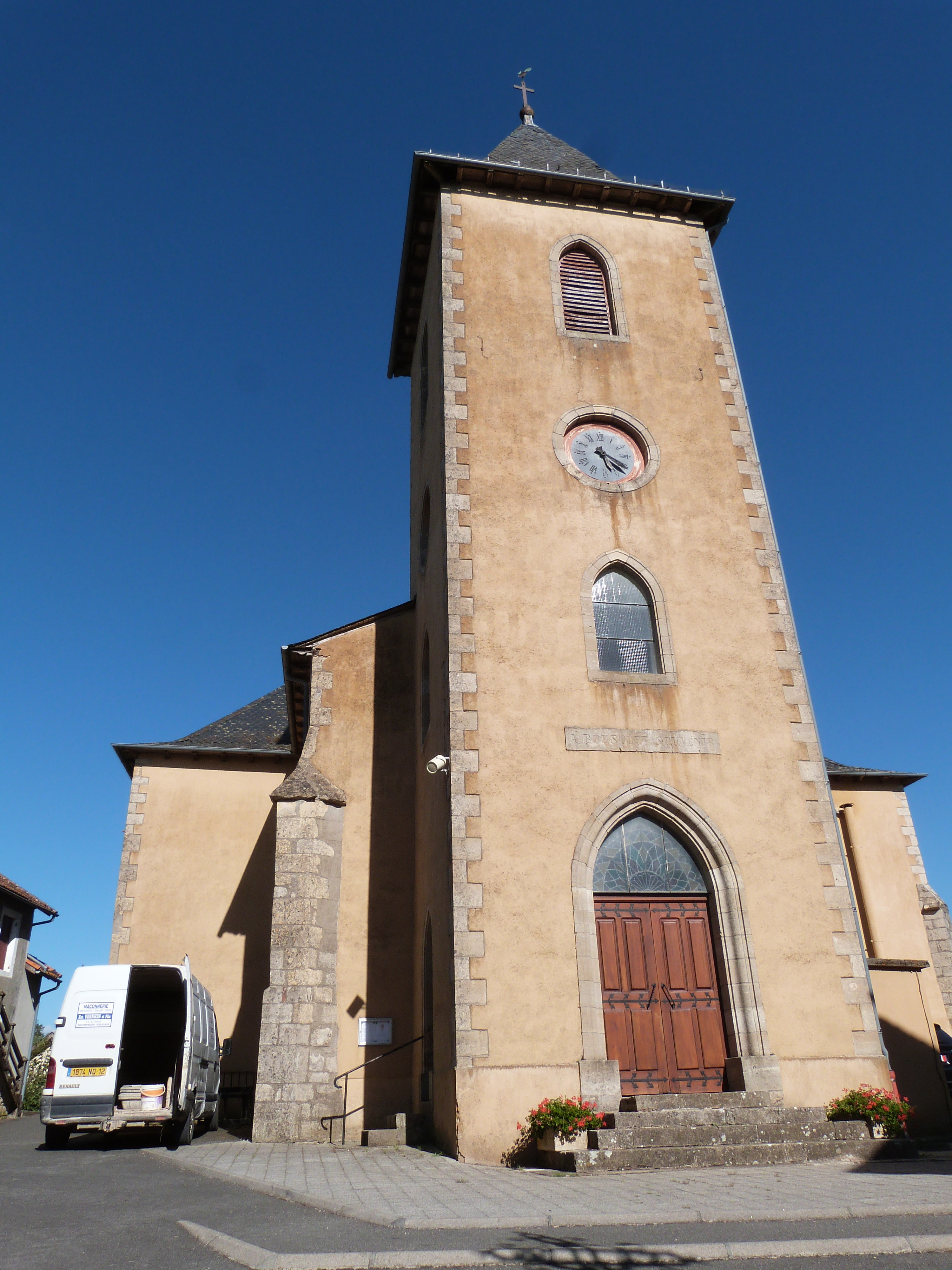 Eglise de Vaureilles